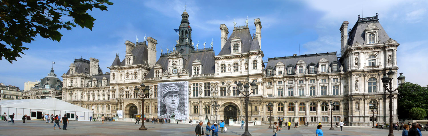 municipalidade de paris